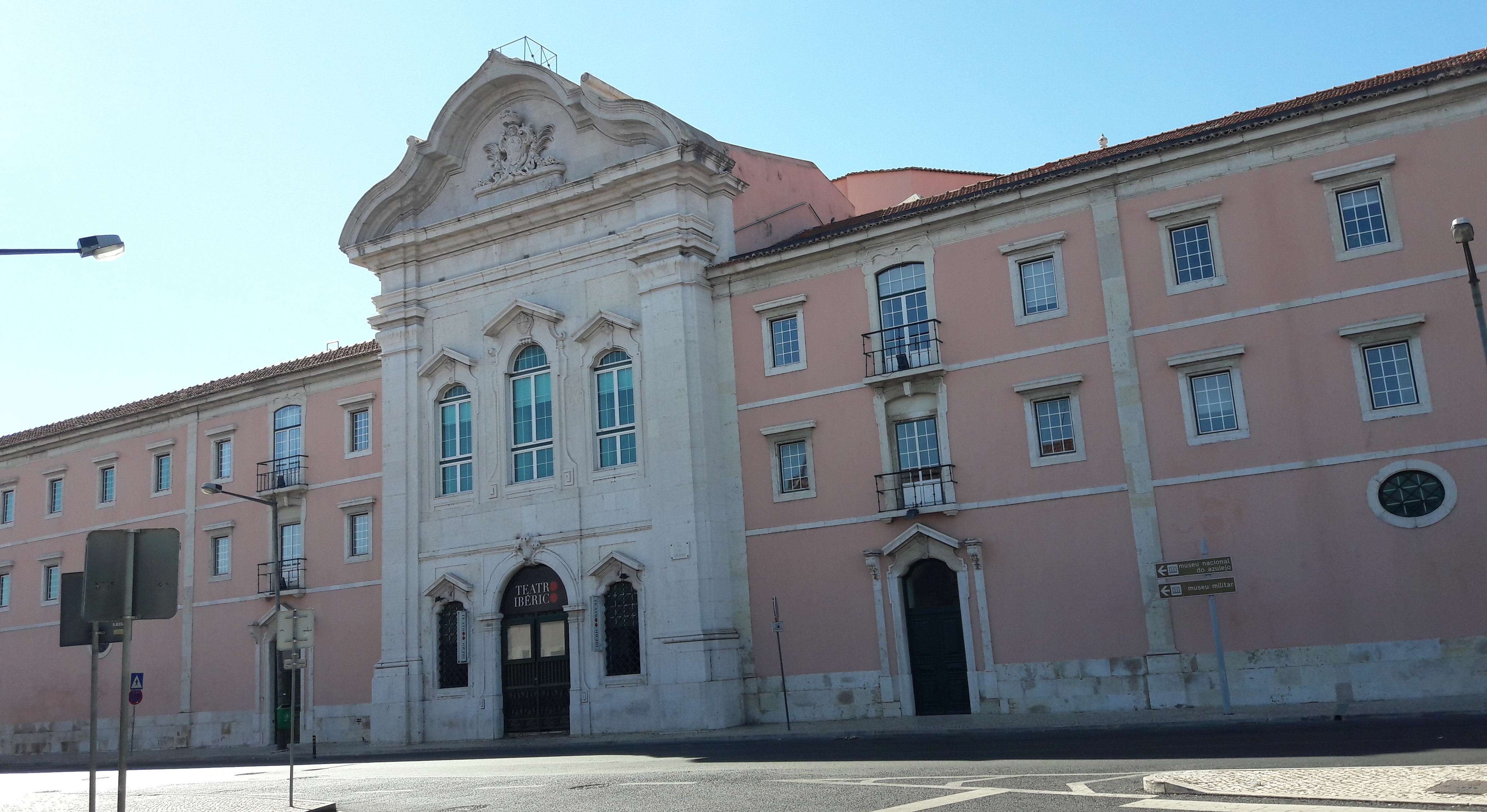 Teatro Ibérico em Xabregas